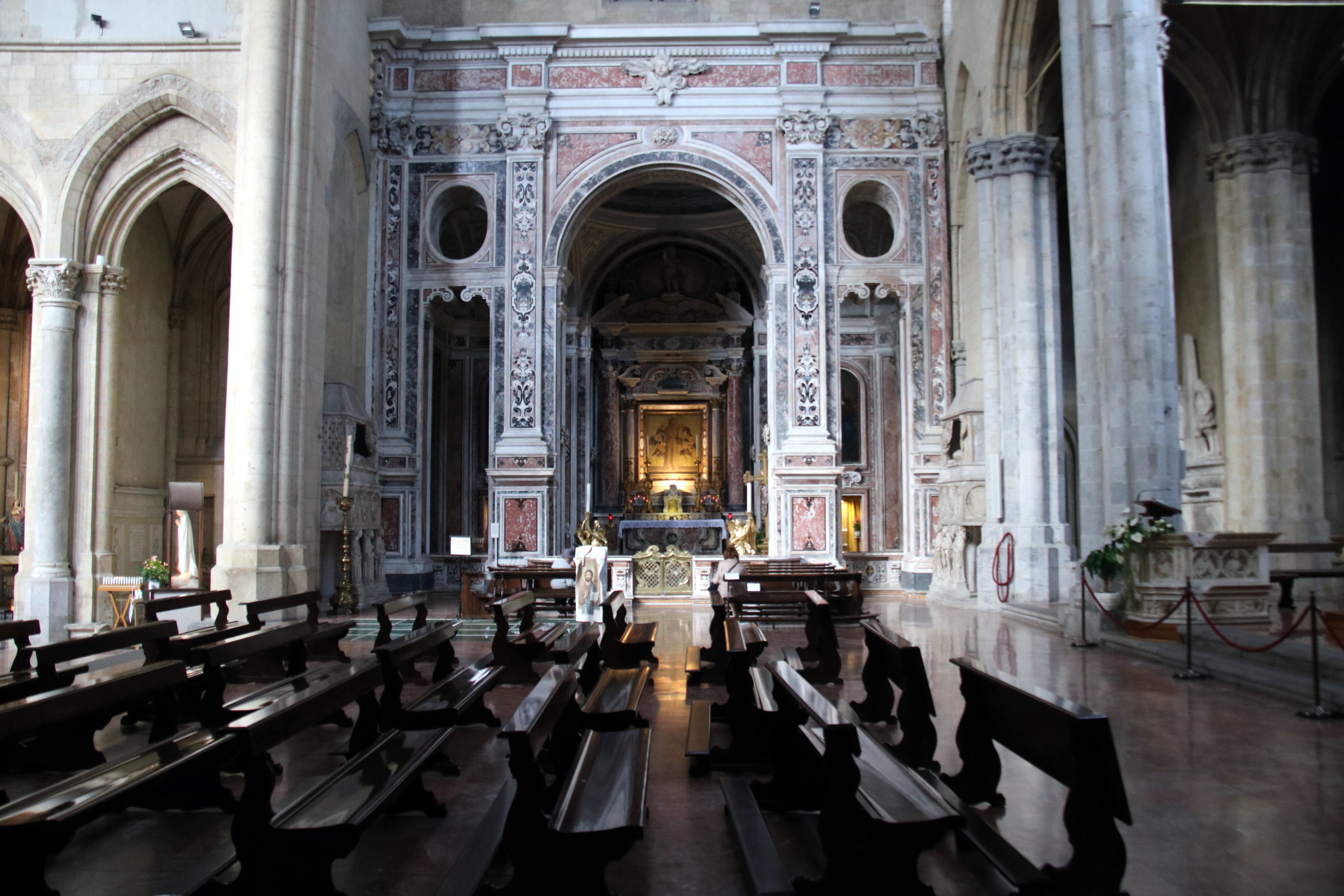 Cappellone di Sant'Antonio, Basilica di San Lorenzo Maggiore (Napoli)